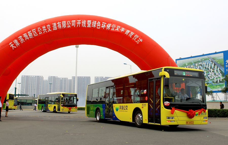 2010年滨海新区共购置新能源低排放环保公交车300多辆